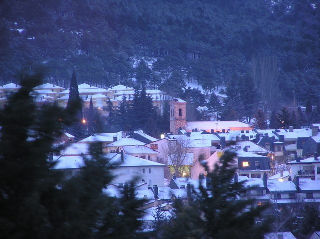 Pueblo de Navacerrada. Escena Invernal. La torre de la Iglesia al anochecer.